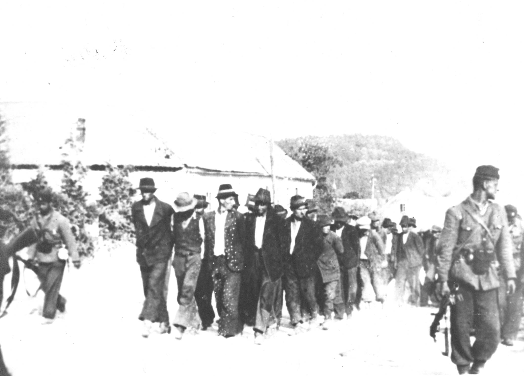 Srpskohrvatski / српскохрватски: Ustaše odvode Srbe na streljanje, Banija, 1942.